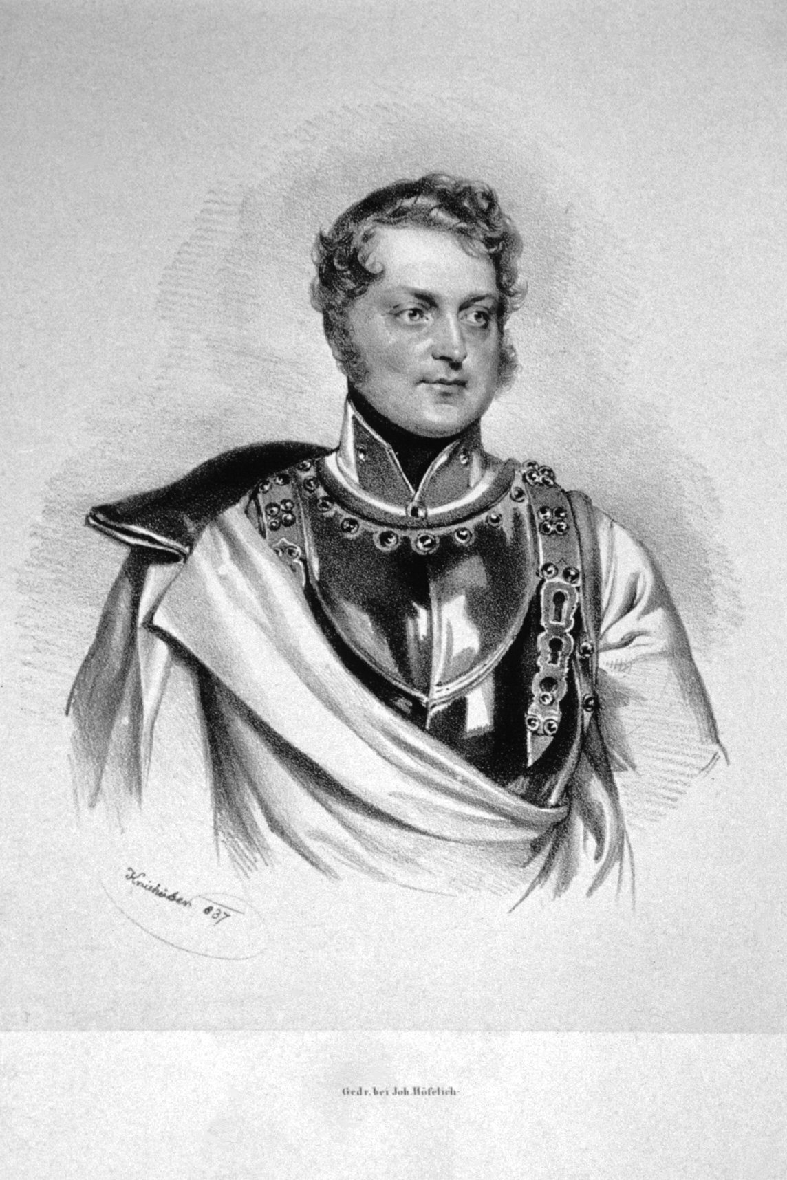 Alfons Markgraf Pallavicini (1807-1875), österreichischer Offizier, Lithographie von Josef Kriehuber, 1837